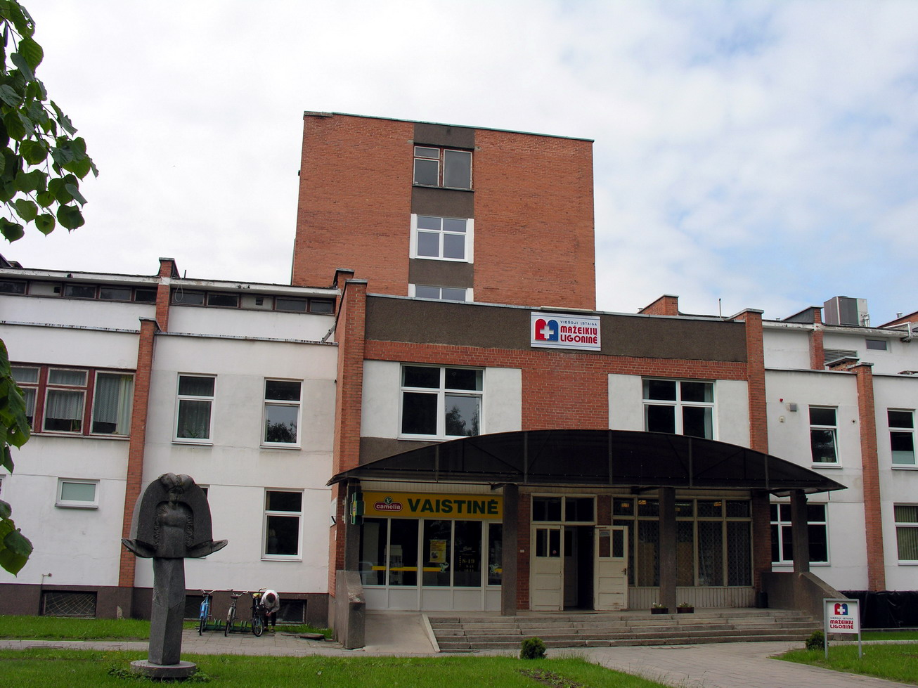 Mažeikių ligoninė Foto: Algirdas, 2006 m. birželio 8 d.